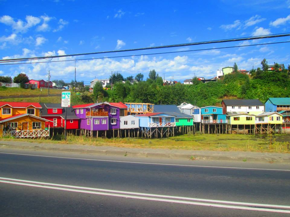 Palafitos ubicados en la entrada norte de la ciudad de Castro.